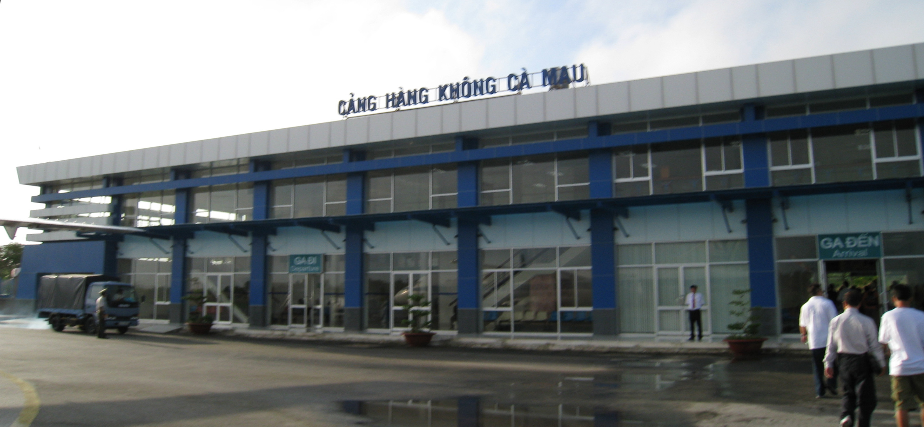 Ca Mau Airport